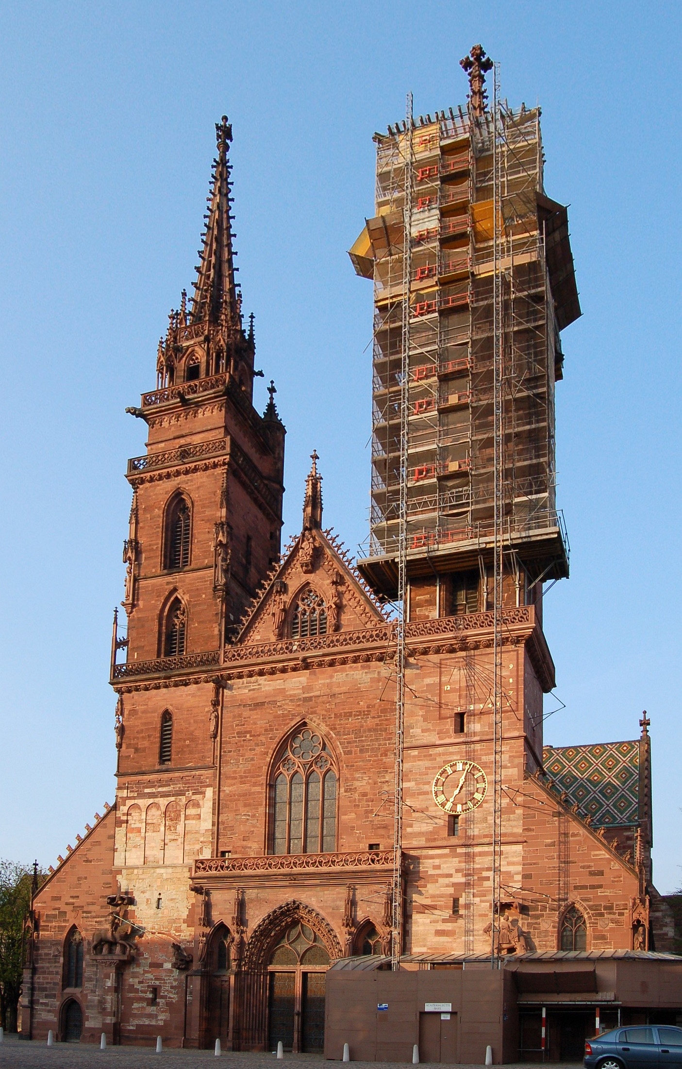 Basler Münster während der Sanierungsarbeiten